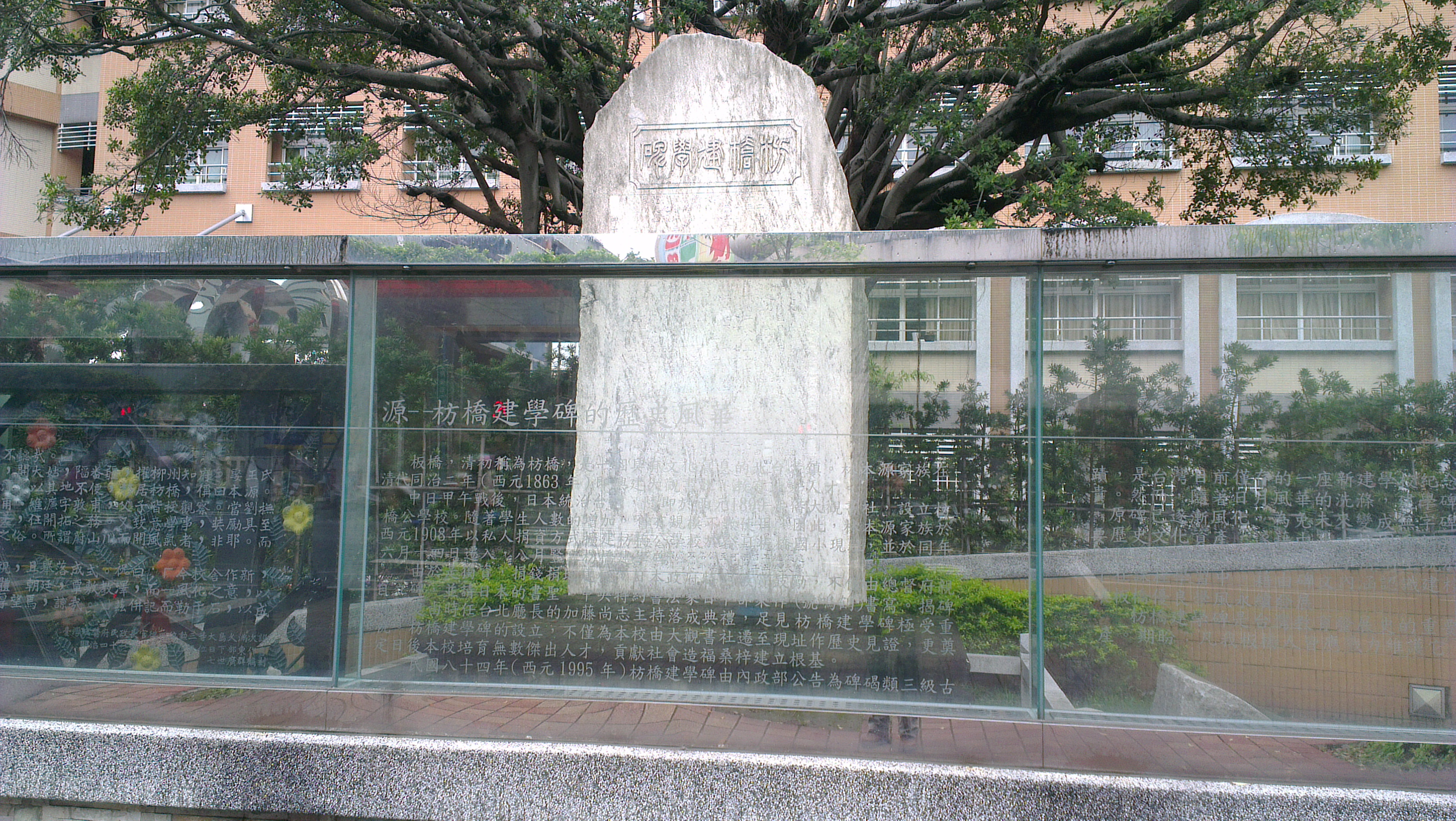 中文（台灣）: 枋橋建學碑